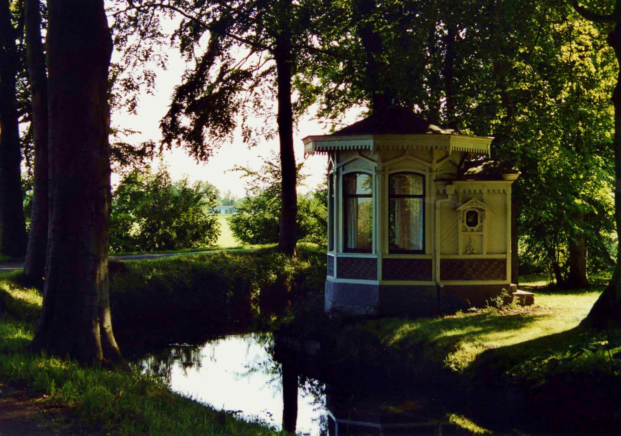 De theekoepen van huize Zwaanwijck te Nigtevecht.